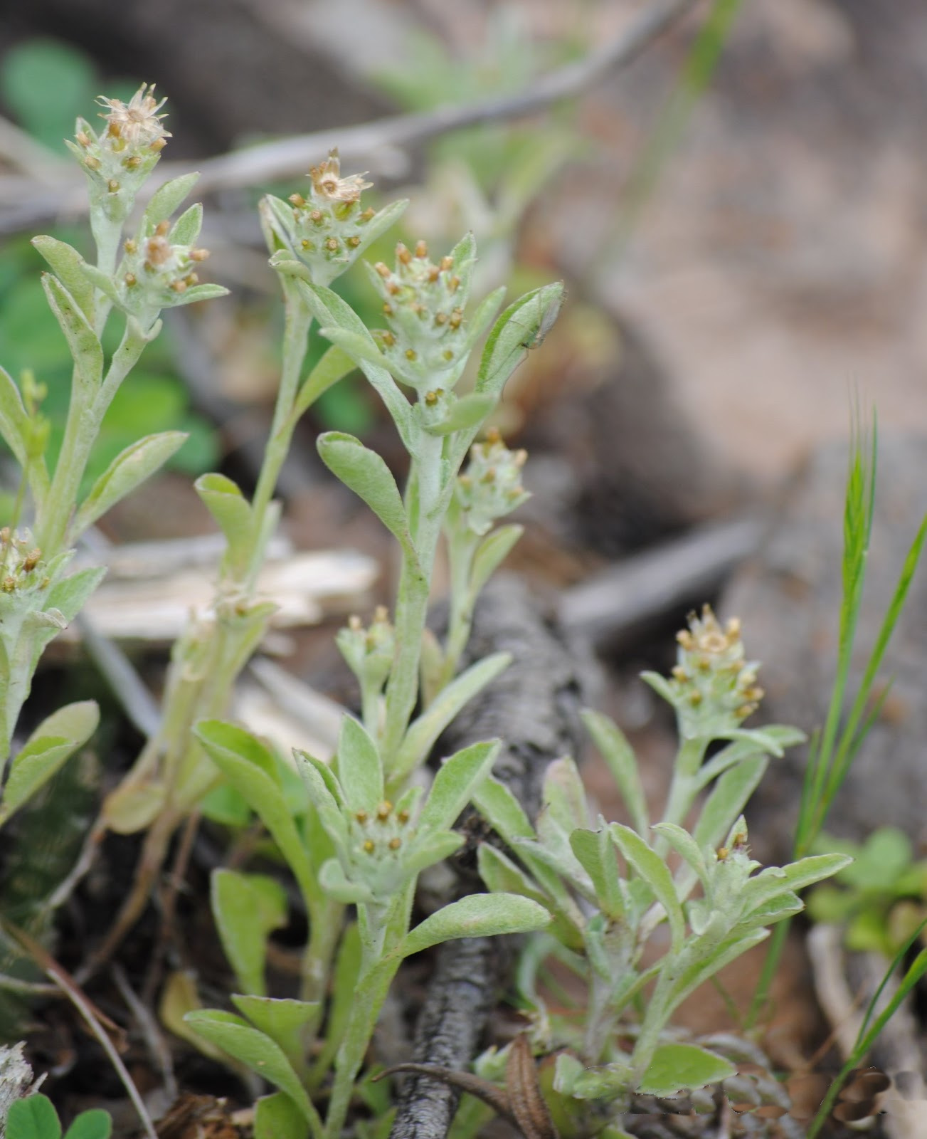 Gamochaeta pensylvanica. Asteraceae. Fotos tomadas sobre suelo arcilloso cercano al dique de la Represa Constitución en Palmar, departamento de Río Negro, Uruguay.